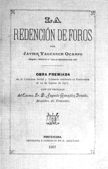 La redención de los foros, de Javier Valcarce Ocampo, 1907, con prólogo de Augusto González Besada